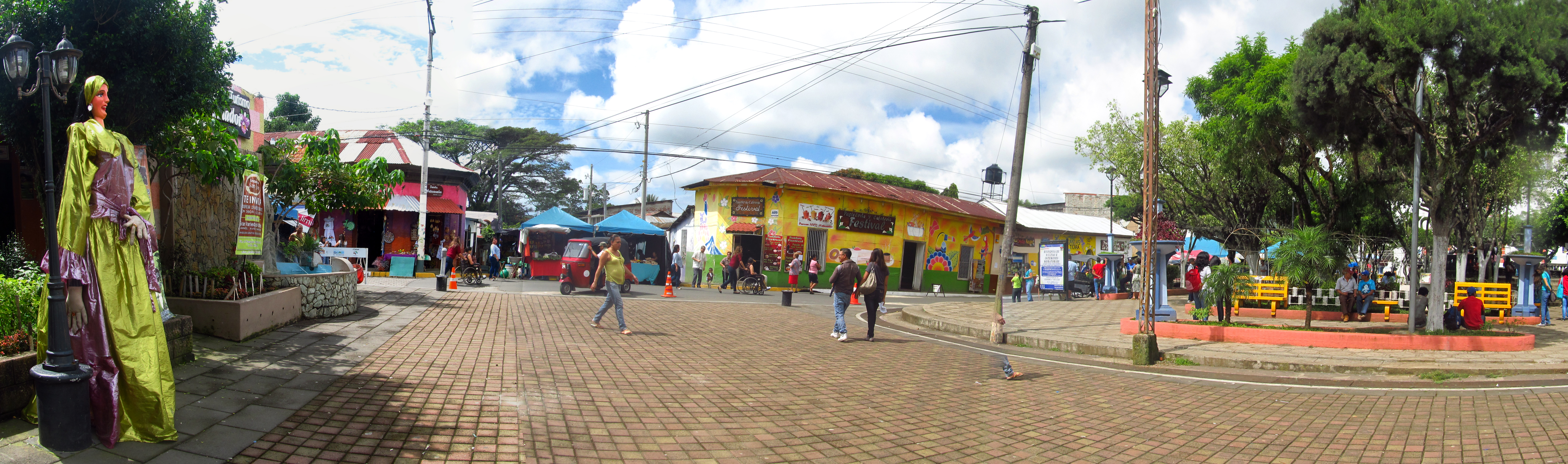 Plaza Central del Centro Histórico de Juayua Fotografía editada para que se aprecie la ciudad. 2 fotografías juntas y Editada en brillos y contrastes.